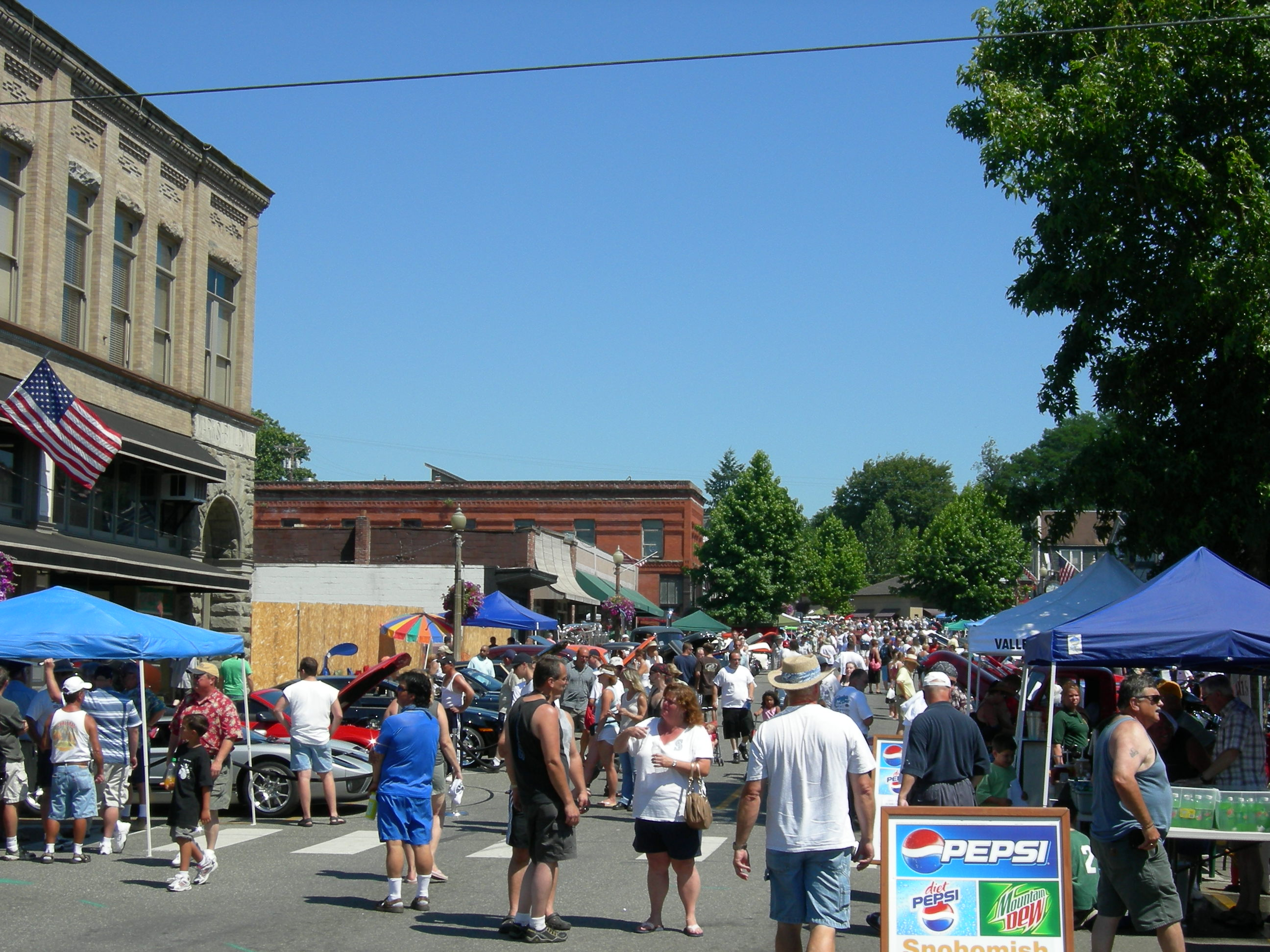 Kla-Ha-Ya days, Snohomish, Washington